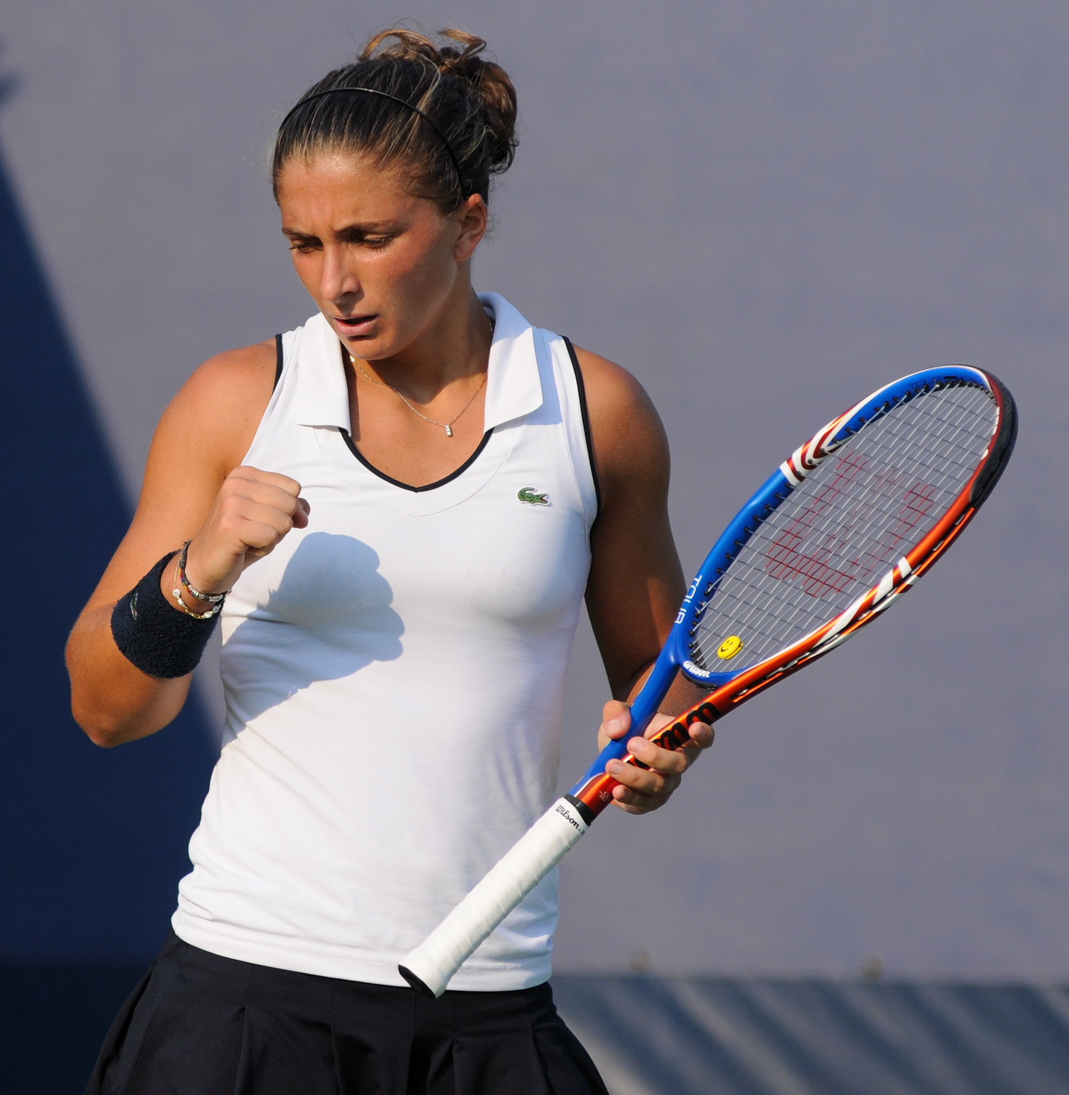 Sara Errani - US Open 2010